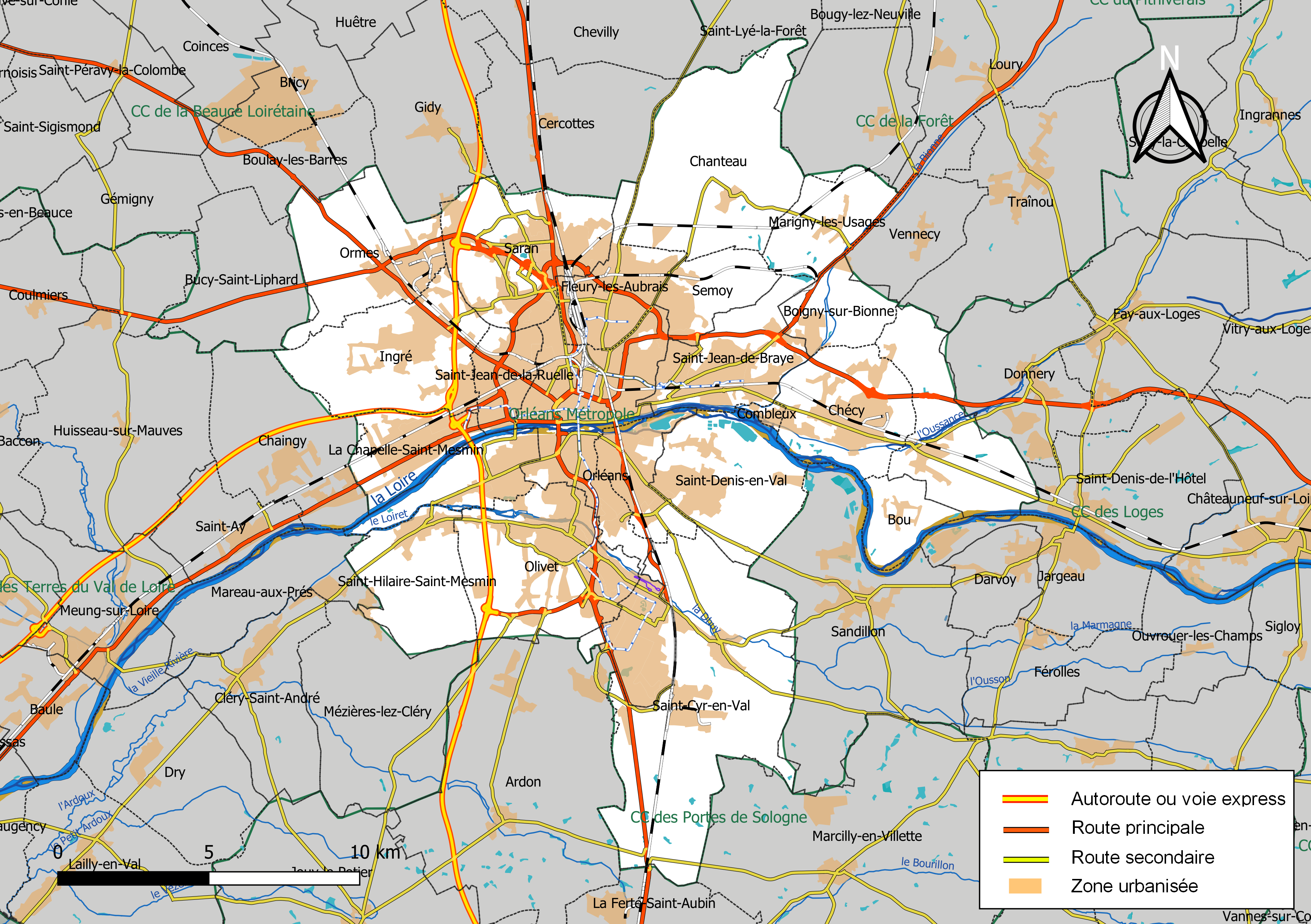 Carte géographique de l'intercommunalité Orléans Métropole, département du Loiret, France. Composition au 1er janvier 2019.